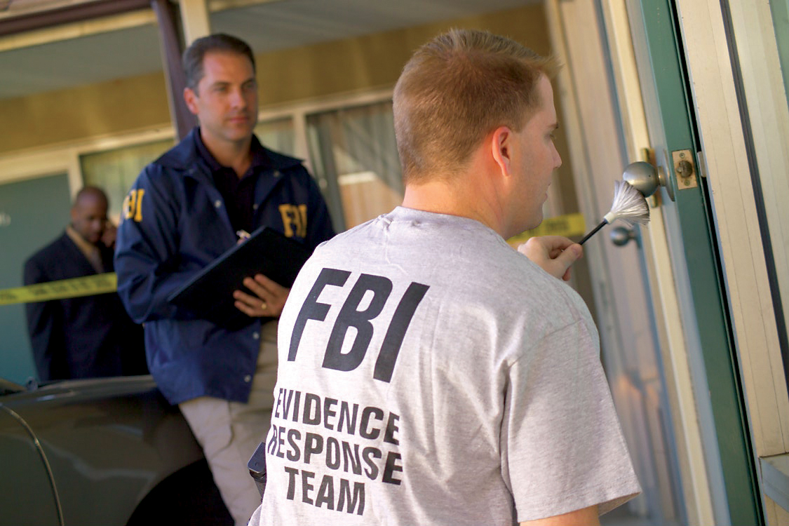 FBI Evidence Response Team.